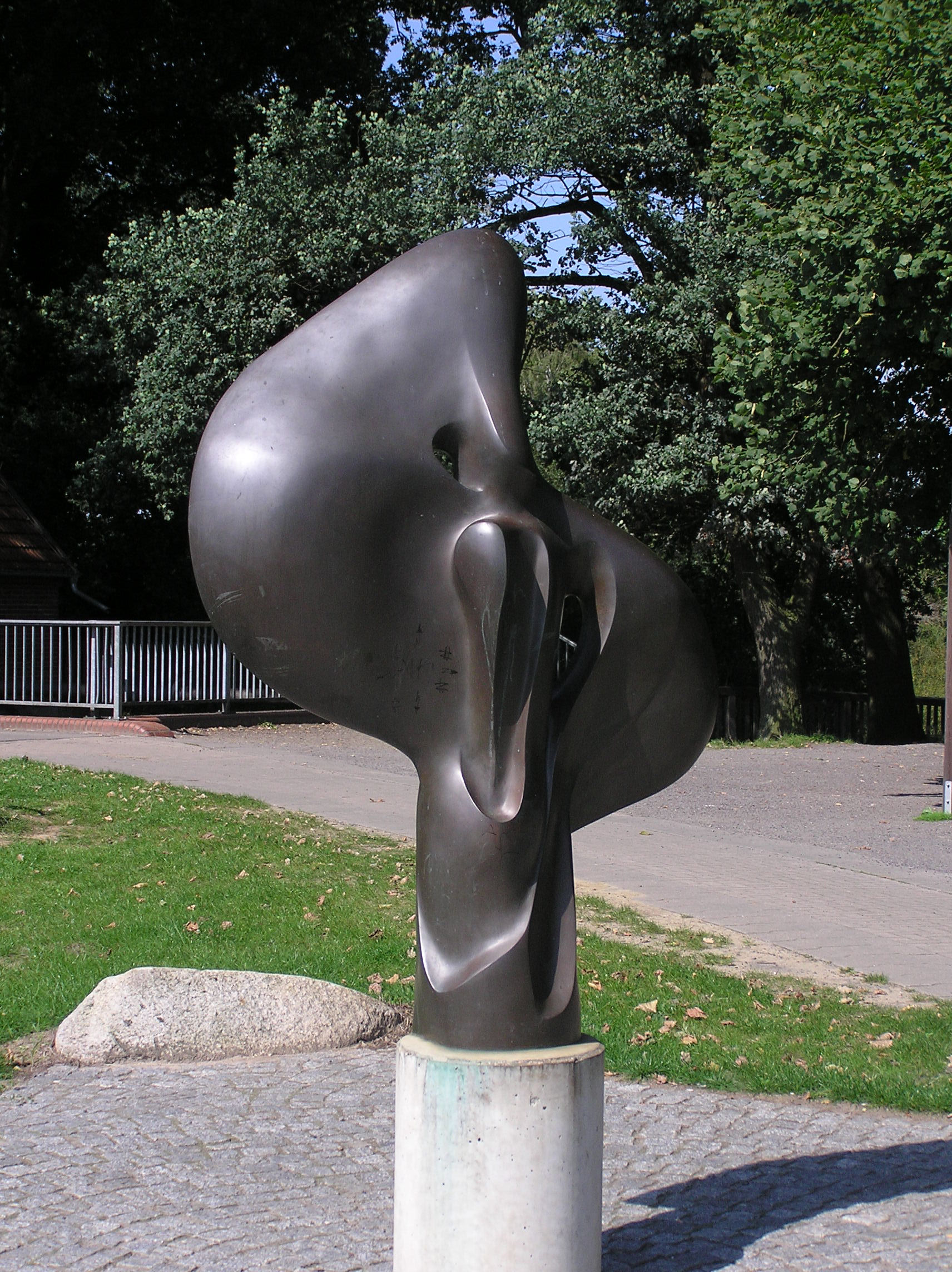 Plastik von Carola Wedell mit dem Titel "Flügel wachsen über dem Delta". Die Plastik steht an der Hase (Fluss) vor Quakenbrück, an der Abzweigung der Überfallhase